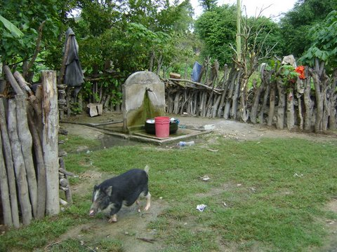 Schwein und Brunnen in Com, Osttimor